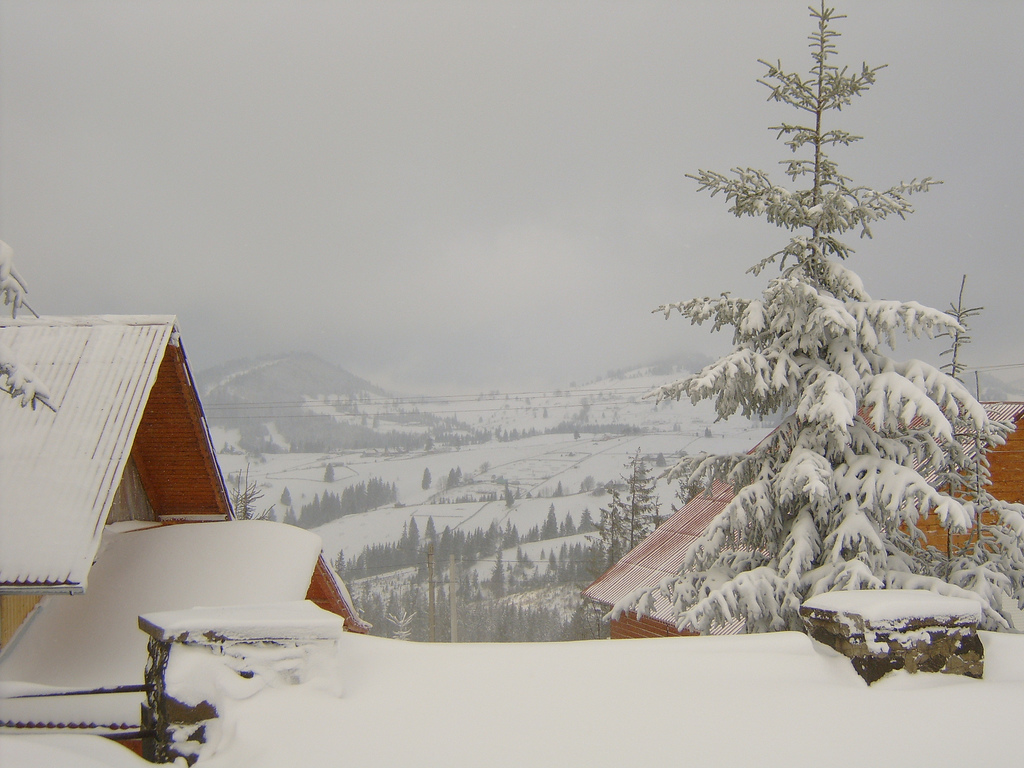 Piatra Fântânele, Tihuta.